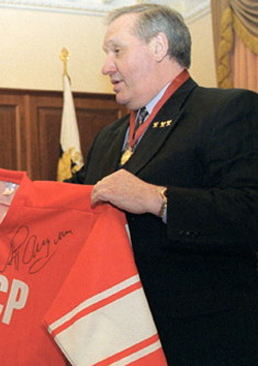 Александр Рагулин